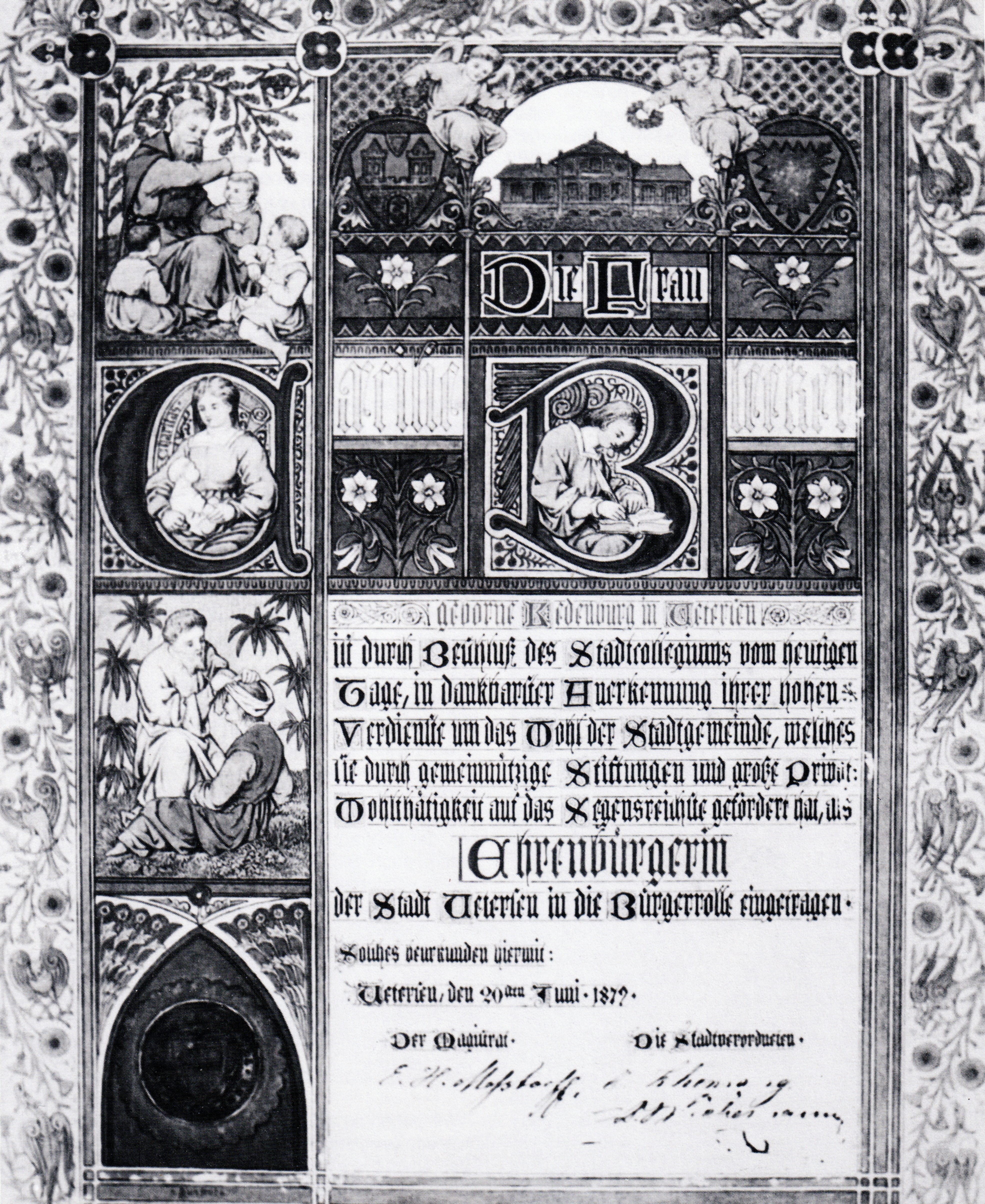 Ehrenbürger-Urkunde von Cäilie Bleeker (1798-1888) vom 20. Juni 1879. Cäcile Bleeker war die erste Ehrenbürgerin der Stadt Uetersen und von Schleswig-Holstein